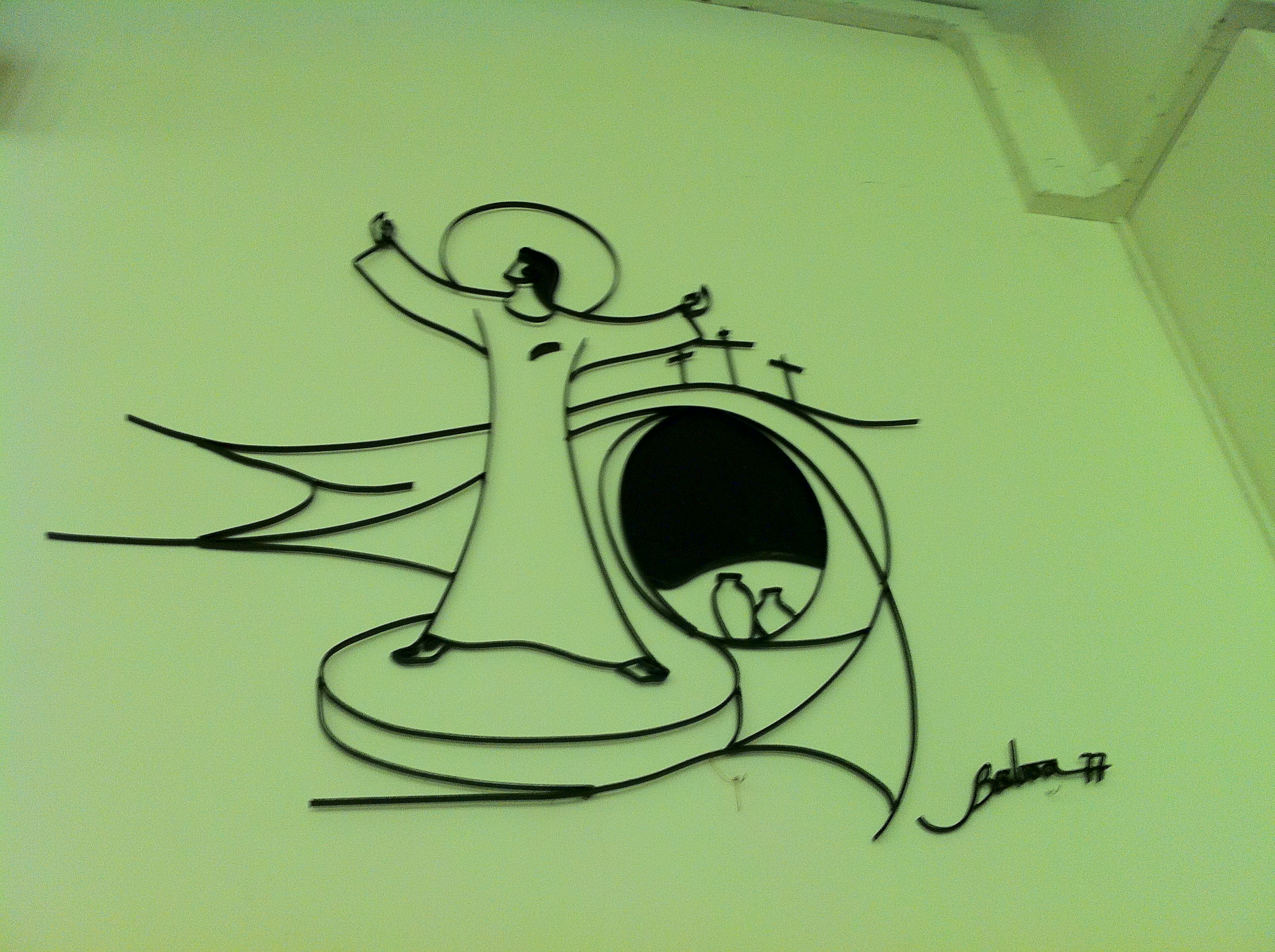 中文（香港）: 聖老楞佐堂, 香港, 中國